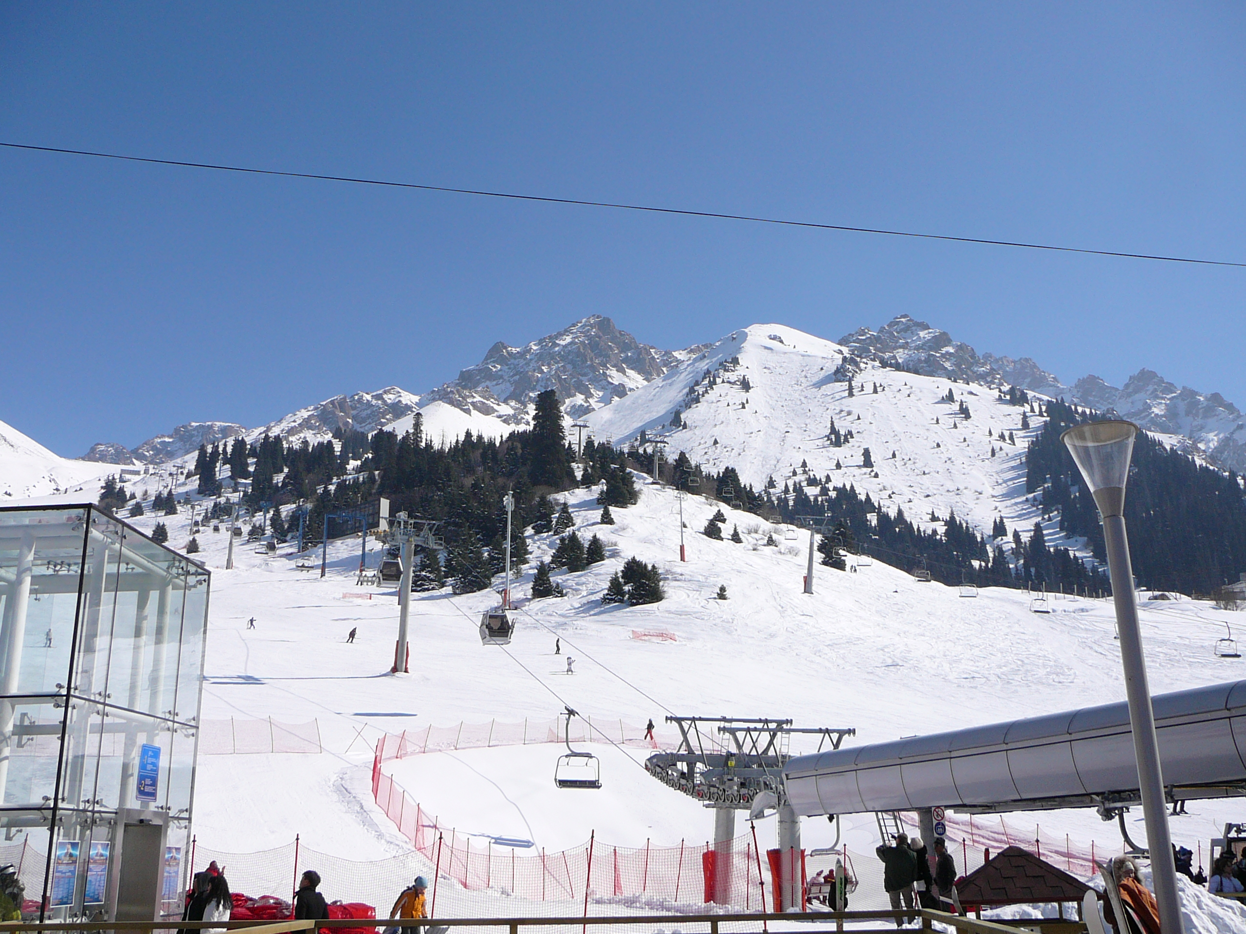 Вид на горы со станции канатной дороги курорта Чимбулак